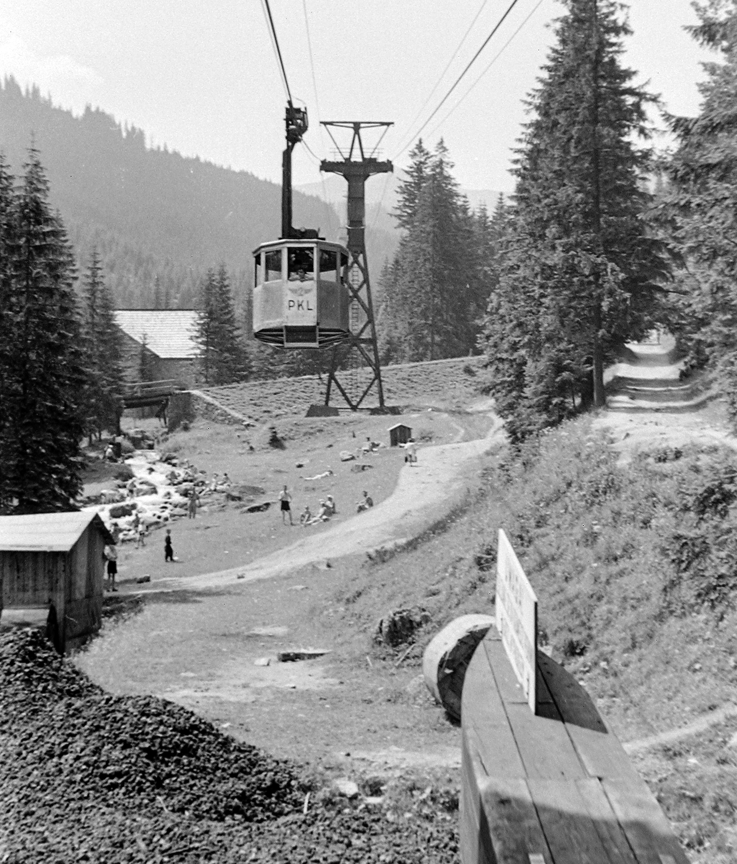 kabinos kötélpálya a Kasprowy csúcshoz, az alsó végállomás. Location: Tatry Wysokie, Poland Tags: cableway, Tatra Mountains Title: kabinos kötélpálya a Kasprowy csúcshoz, az alsó végállomás.